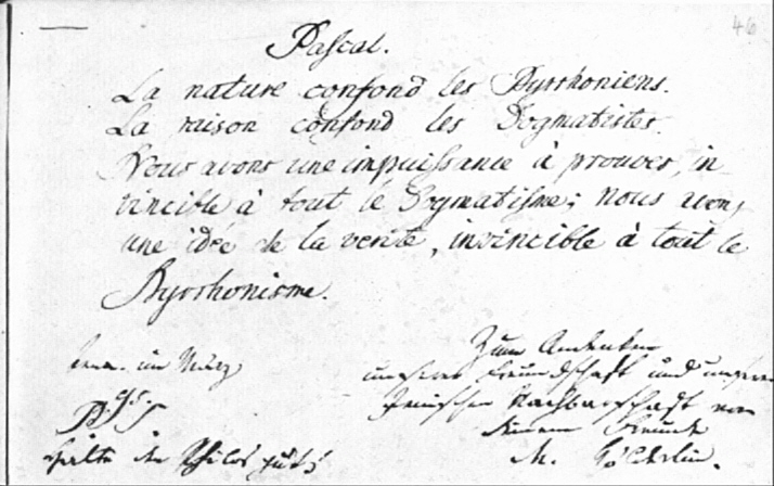 Eintragung von Friedrich Hölderlin im Stammbuch des Tübinger Medizinstudenten Johann Camerer (Einträge 1790–1796), März 1795, S. 46r